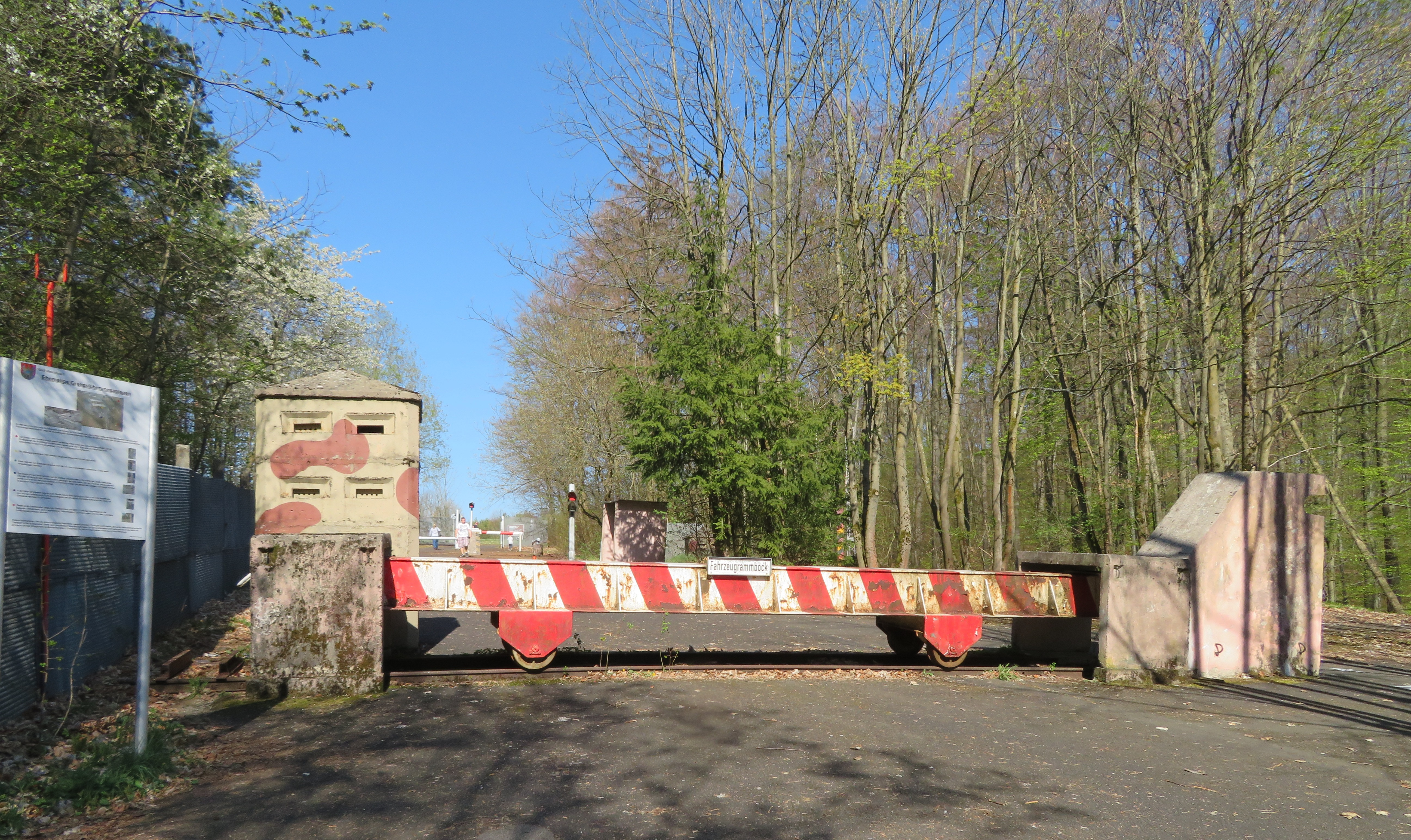 Grenzreste bei Mellrichstadt